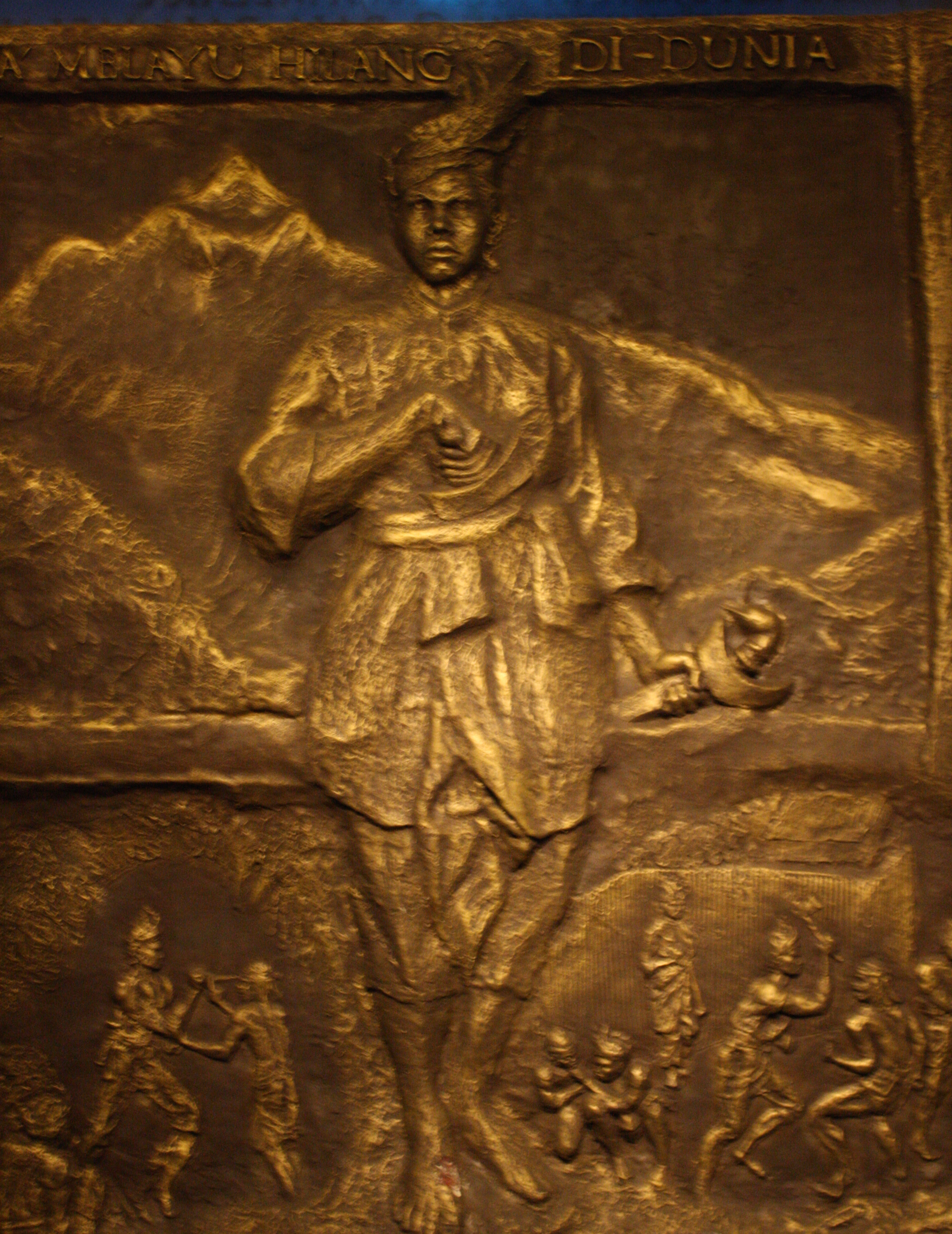 The bronze sculpture of Hang Tuah in Muzium Negara, Kuala Lumpur, Malaysia.